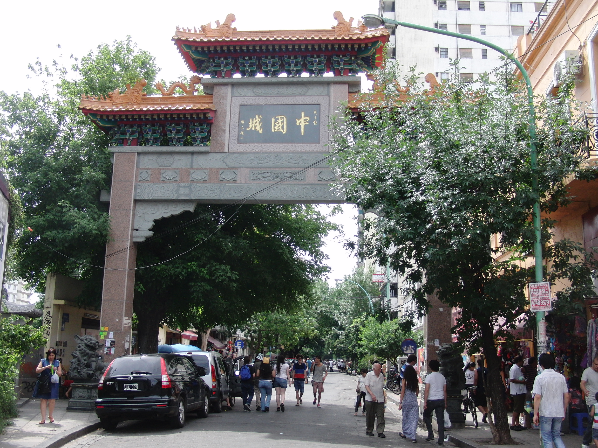 Eingangstor in das 'Barrio Chino' Chinesenviertel von Buenos Aires